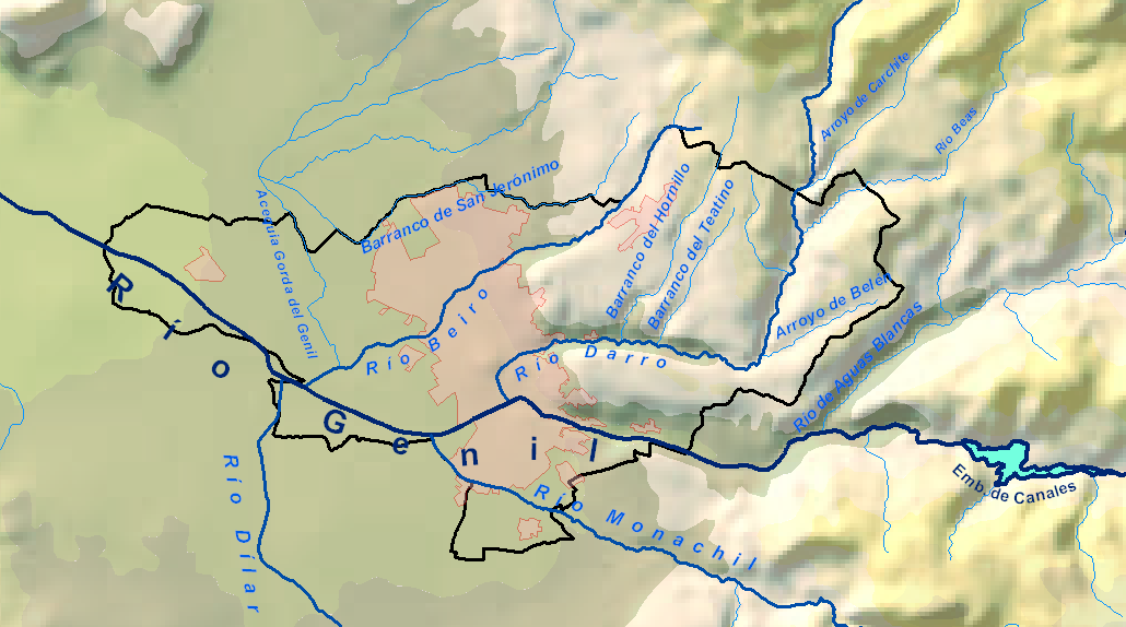 Red hidrográfica del Término Municipal de Granada (España)